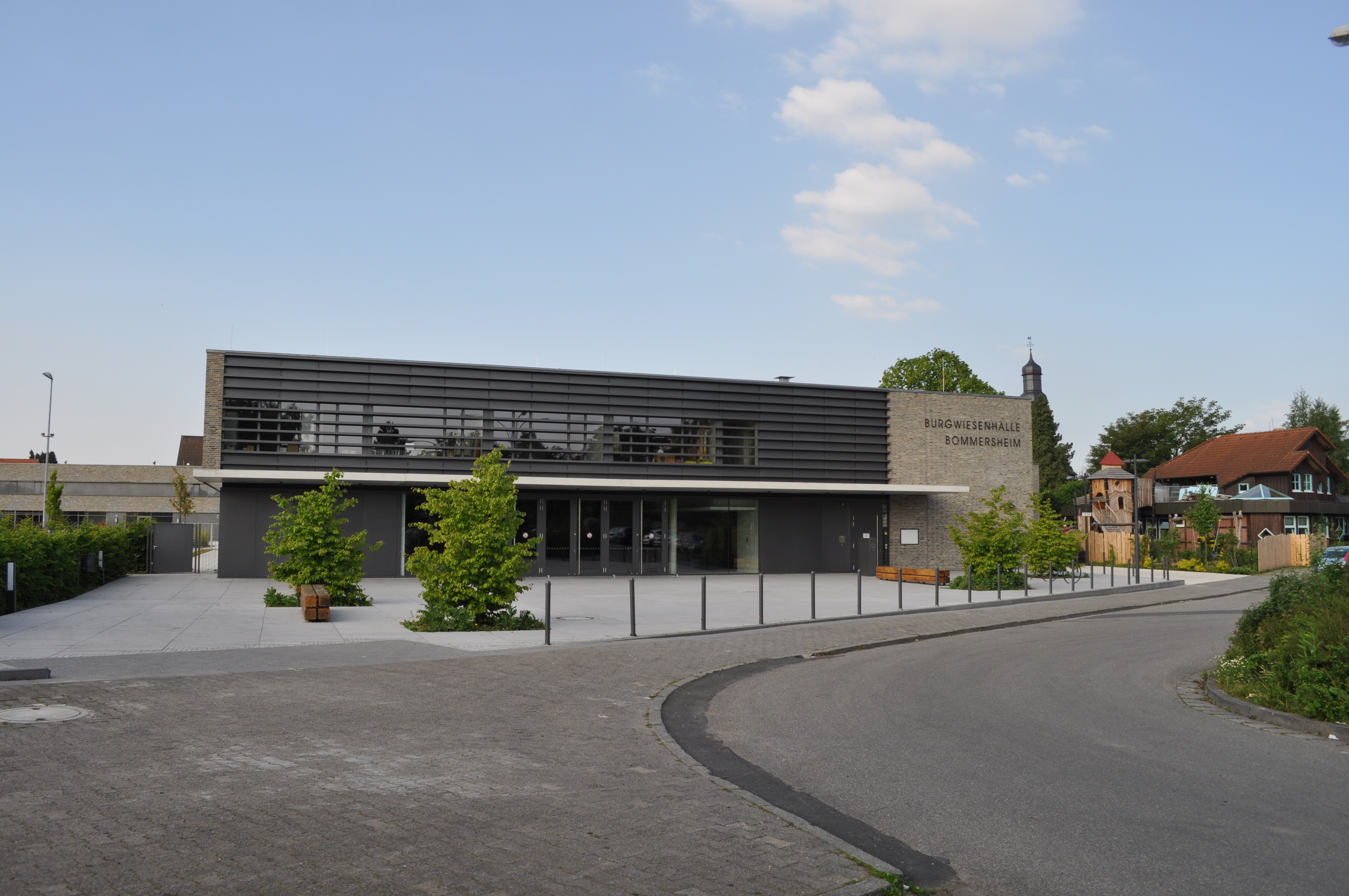 Bommersheim, Burgwiesenhalle, im Hintergrund Kindergarten und Kirche